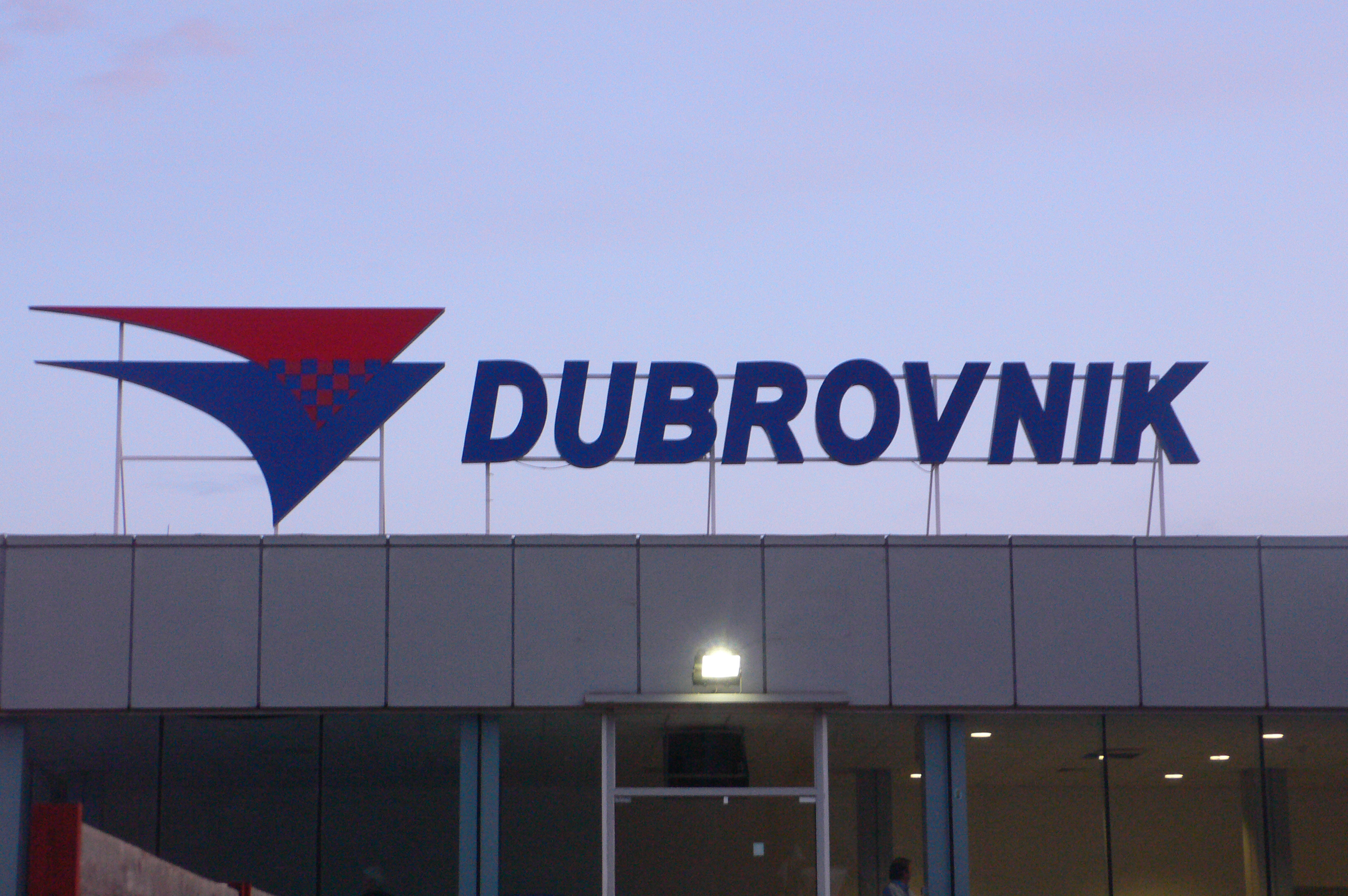 dubrovnik airport